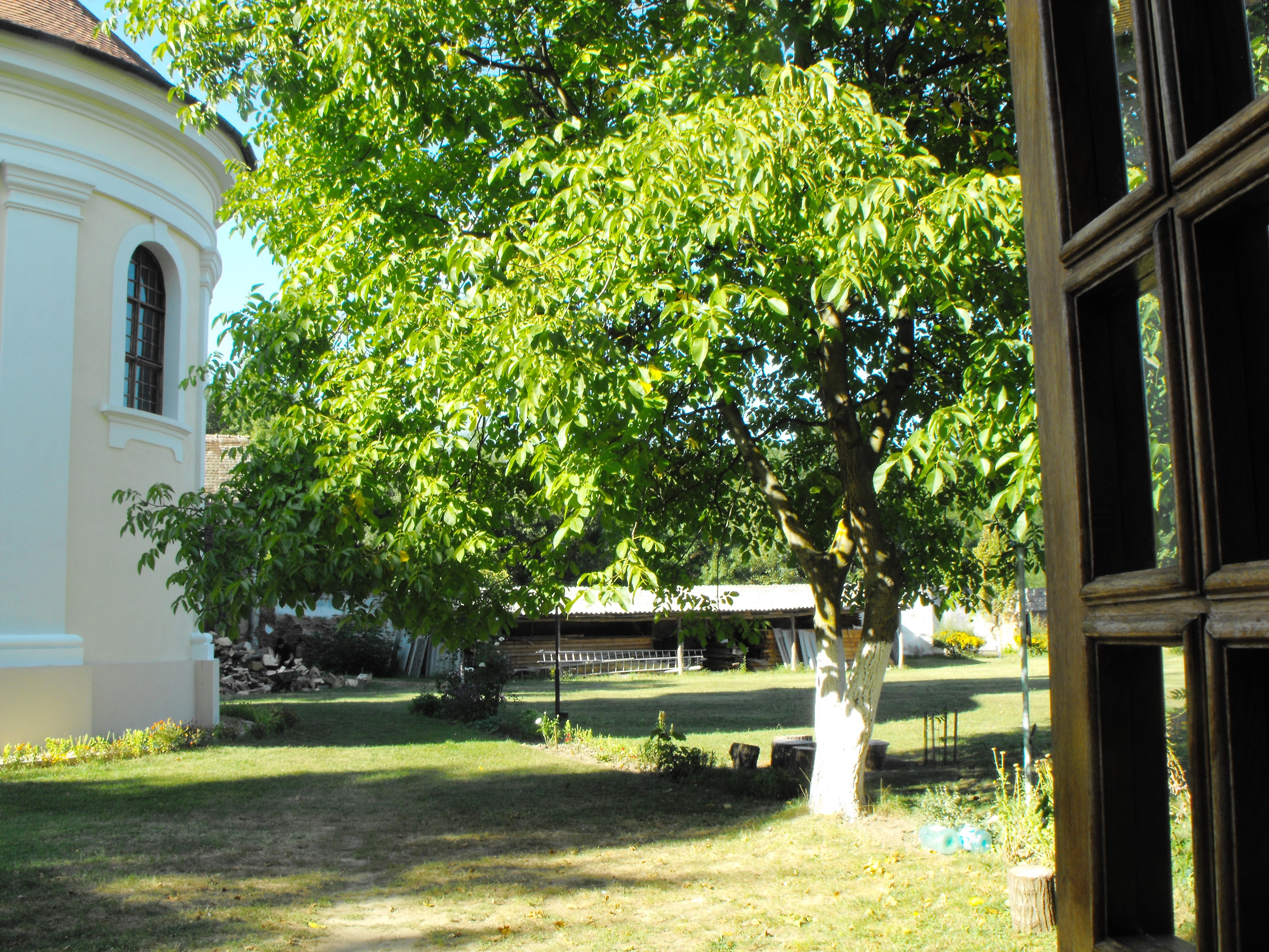 Proaspăt restaurată, biserica mănăstirii sârbe din satul Mănăstire, com. Birda, jud. Timiş adăposteşte capul şi lanţurile Sfântului Gheorghe 01